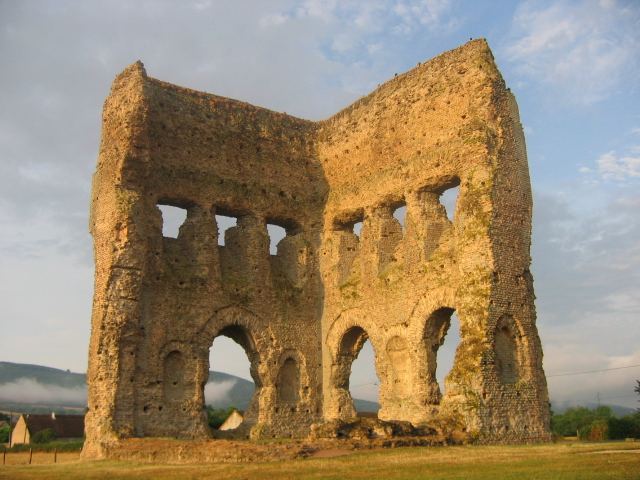 Temple de Janus, Autun, France.